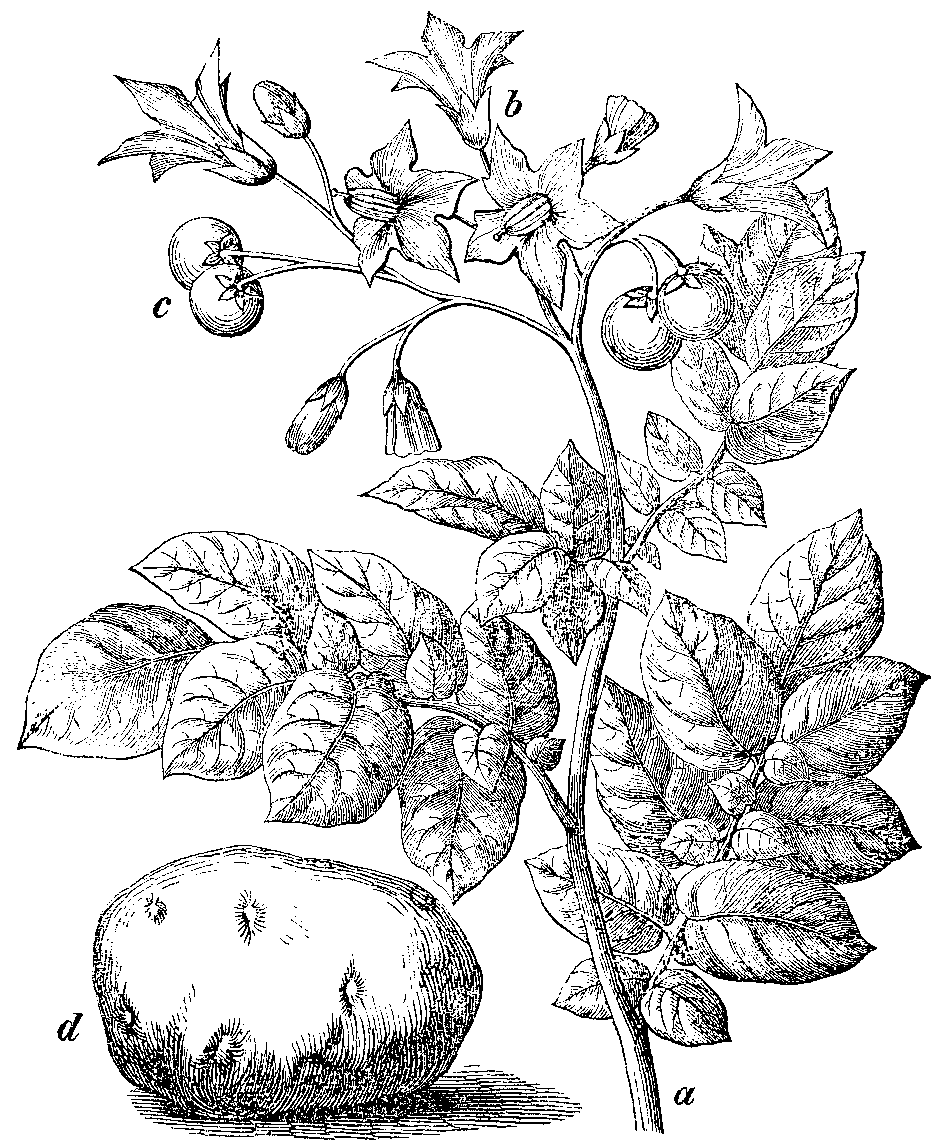 Slika 85. Podzemljica [sic!]. (Solánum tuberósum.)